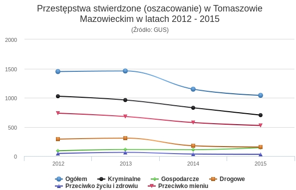 Przestępstwa w Tomaszowie w latach 2012-2015